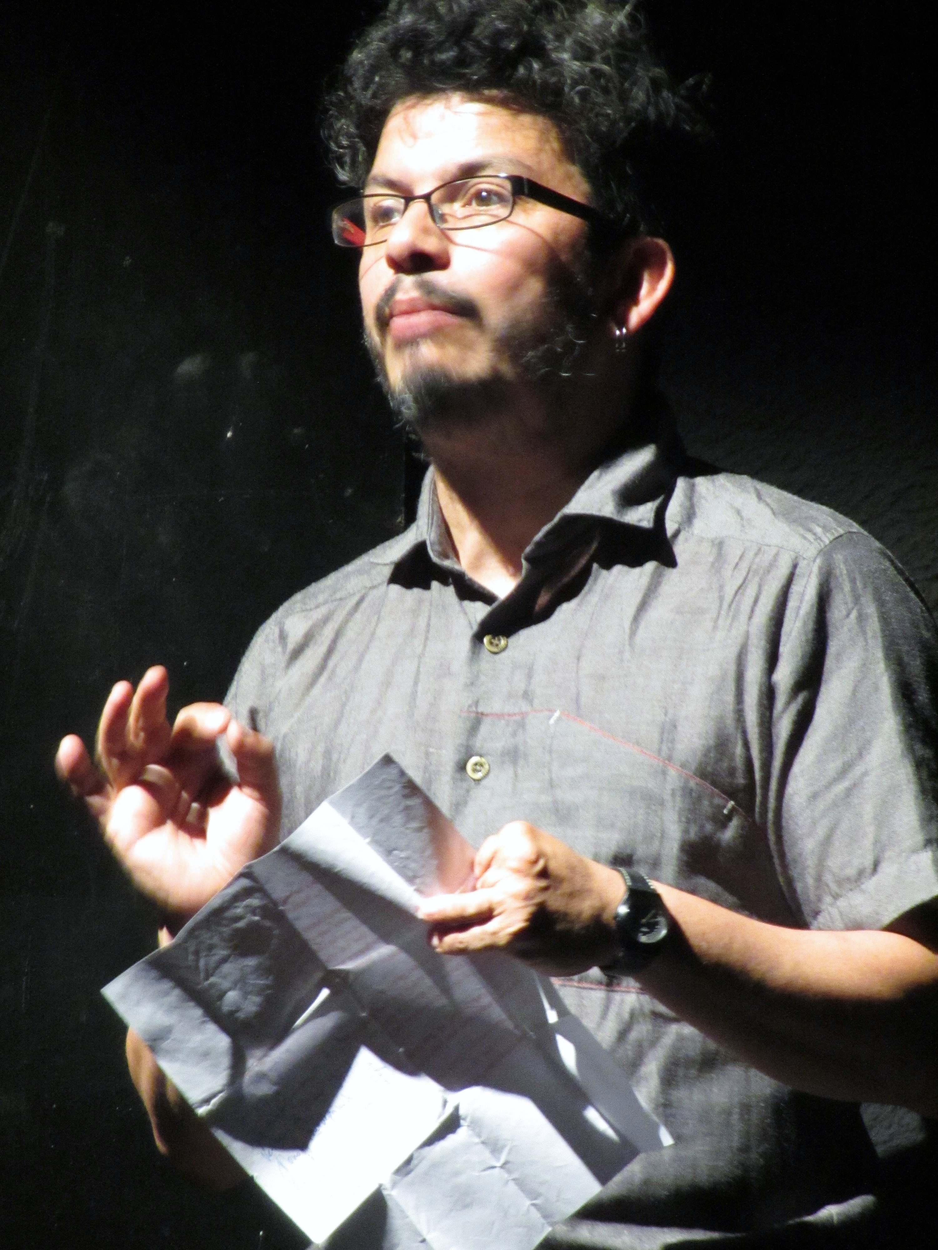 El escritor chileno Marcelo Leonart presentando la pieza Liceo de niñas de la escritora y actriz chilena Nona Fernández, 2015-12-09 compañía Pieza Oscura en el Teatro de la Universidad Católica